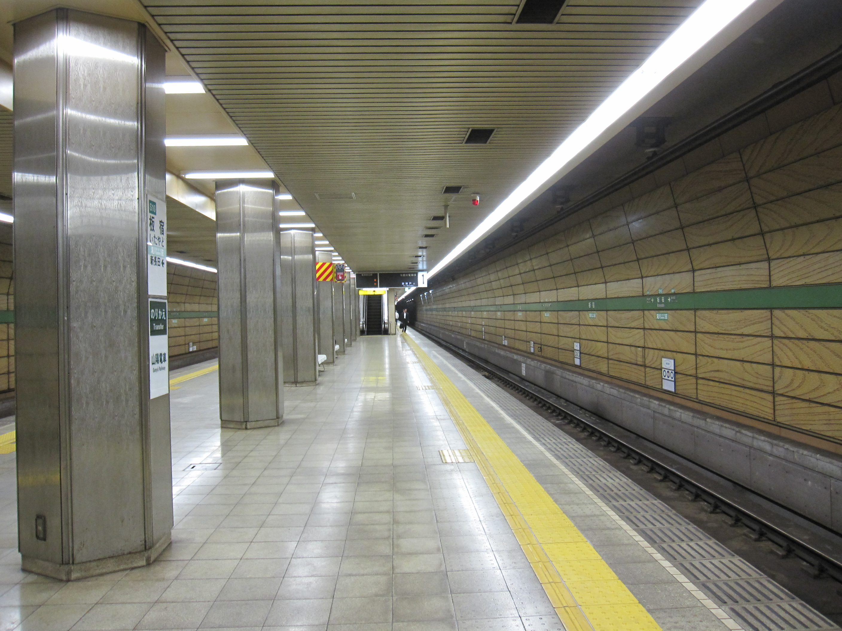 神戸市営地下鉄板宿駅